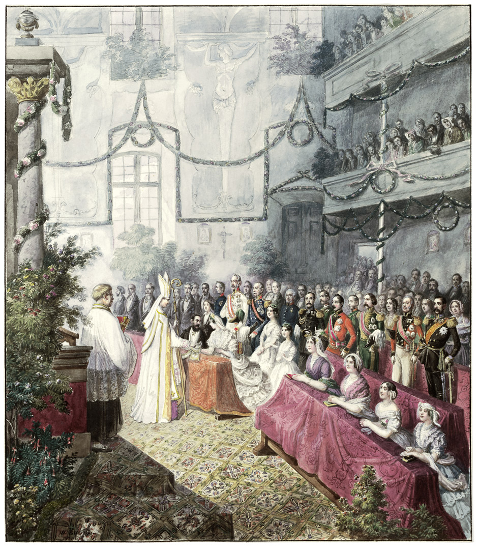 Die Hochzeit von Adelheid Prinzessin von Löwenstein-Wertheim-Rosenberg (1831-1909) mit (Ex-)König Michael I. von Portugal (1802-1866) am 24. September 1851 auf Schloß Kleinheubach (Bayern).